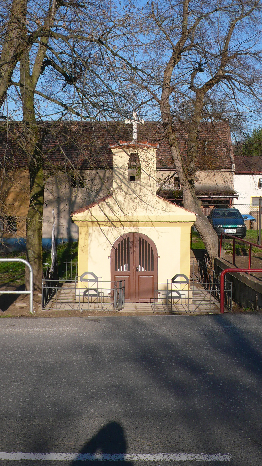 Kaple (Bakov), Bakov